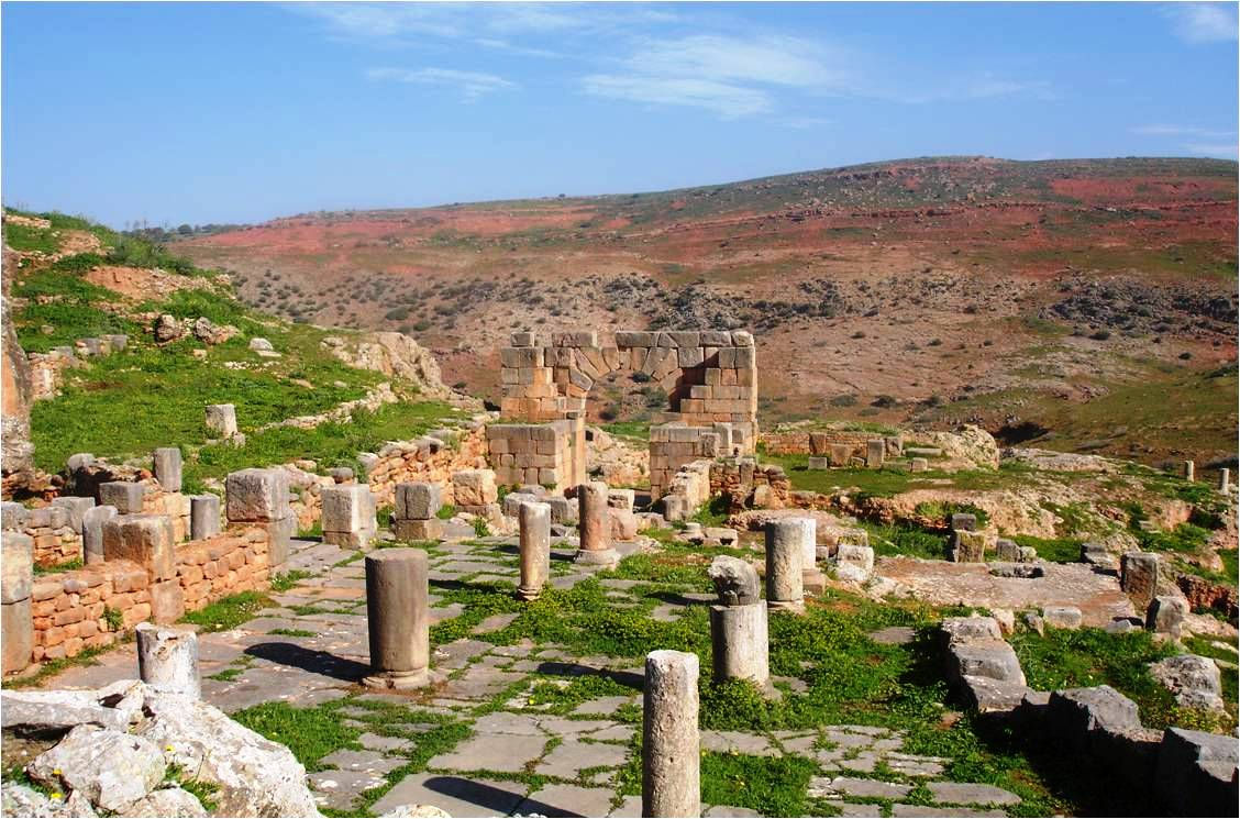 site archéologique de TIDDIS à Constantine Algérie